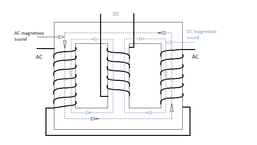 Magnetvõimendi kasutades kolme jalaga südamikku.